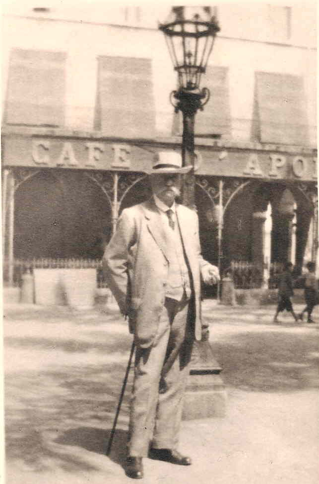 Esta es una foto del fundador, del hotel D'angelis MR. GIACOMO D'ANGELIS , ESTA FOTO FUE TOMADA CON SU PEQUEÑA CAMARA, EN ARGEL JULIO DE 1919, EL SR D'ANGELIS SE ENCUENTRA FRENTE AL CAFE D'APOLO , en ARGEL AFRICA, ESE MES EL CUMPLIA 77 AÑOS al dorso de esta foto tiene una dedicatoria del sr.LOUIS D'ANGELIS PARA SU HIJA SRA BERTHA D'ANGELIS GROSE.